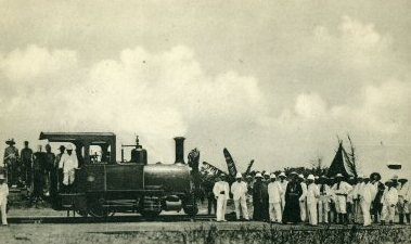 Arrivée de la première locomotive de la ligne de chemin de fer Matadi-Léopoldville à Ndolo, Kinshasa, 1898.